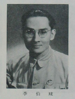 中文（台灣）: 中國人民政治協商會議第一屆全體會議代表